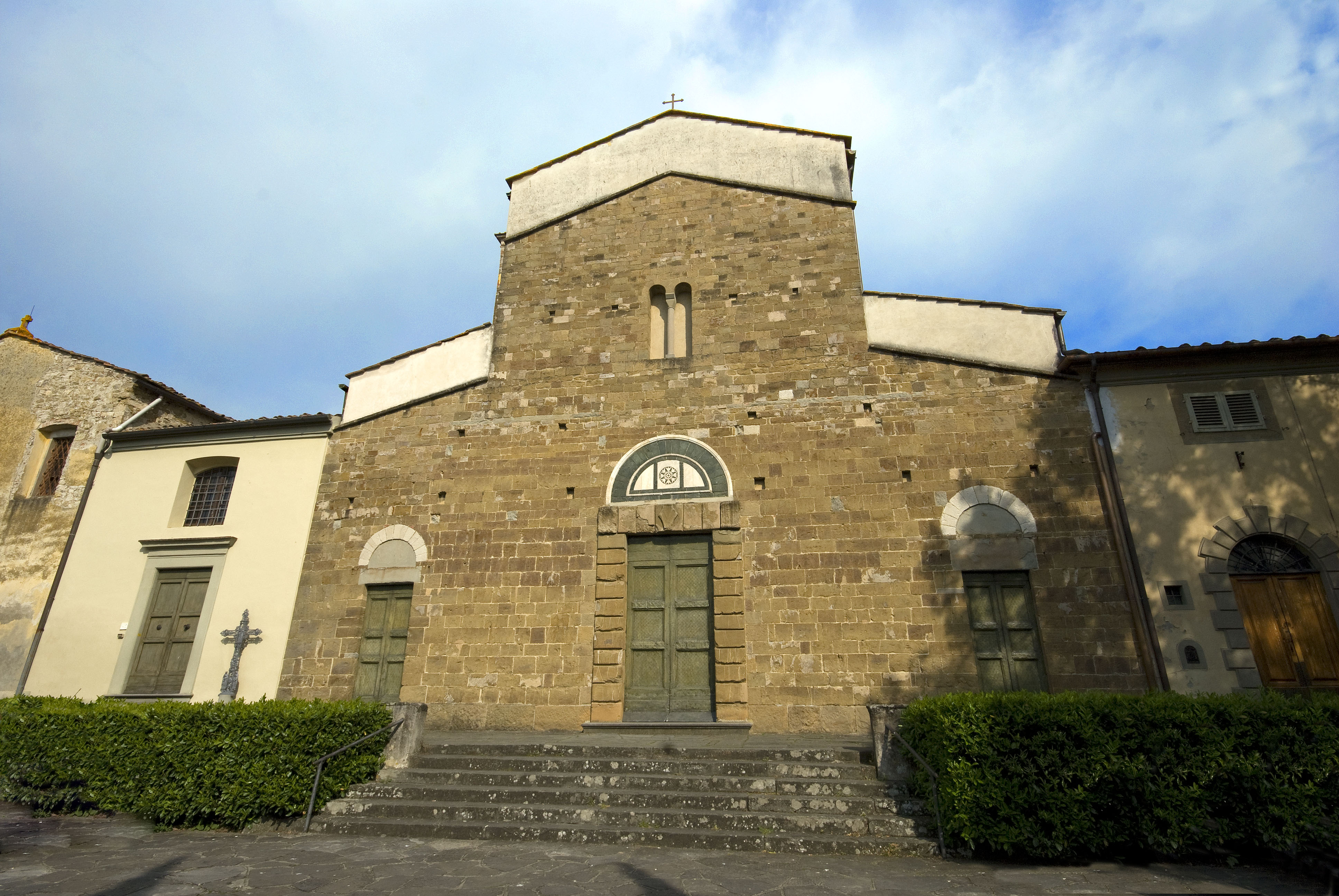 Chiesa di San Felice a Ema (Firenze)